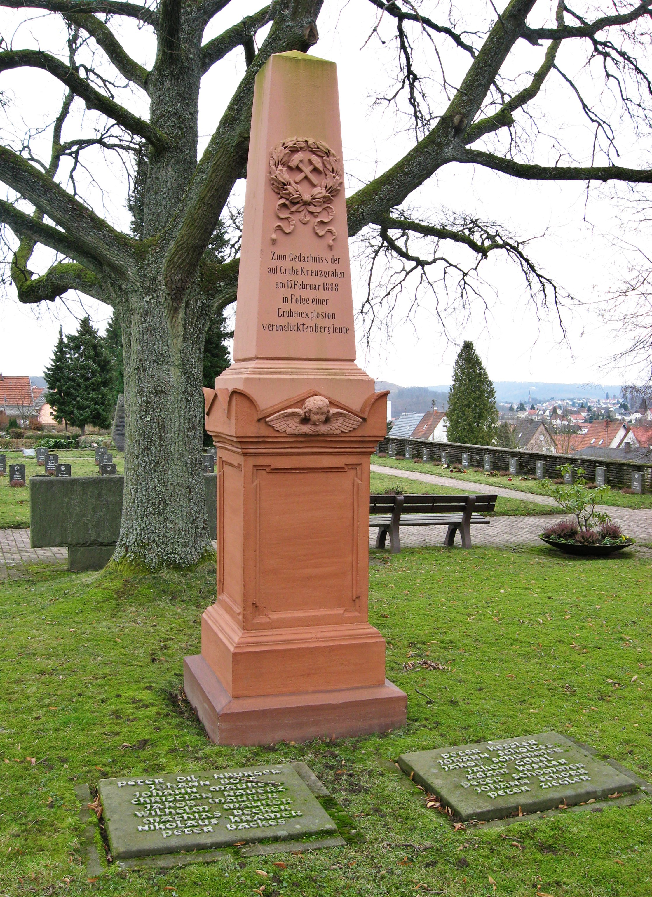 Denkmal für die 17 Opfer des Grubenunglücks von 1888 in Quierschied im Saarland. Inschrift: "Zum Gedächtnis der auf Grube Kreuzgraben am 15. Februar 1888 in Folge einer Grubenexplosion verunglückten Bergleute"). Die Tafeln tragen die Namen der verunglückten Quierschieder Bergleute